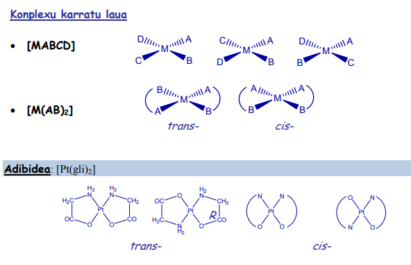 Konplexu karratu lauen egitura eta adibidea